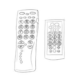 ภาพแสดงการออกแบบแป้นตัวเลขและสัญลักษณ์ที่ใหญ่ ชัดเจน ง่ายต่อการเข้าใจ